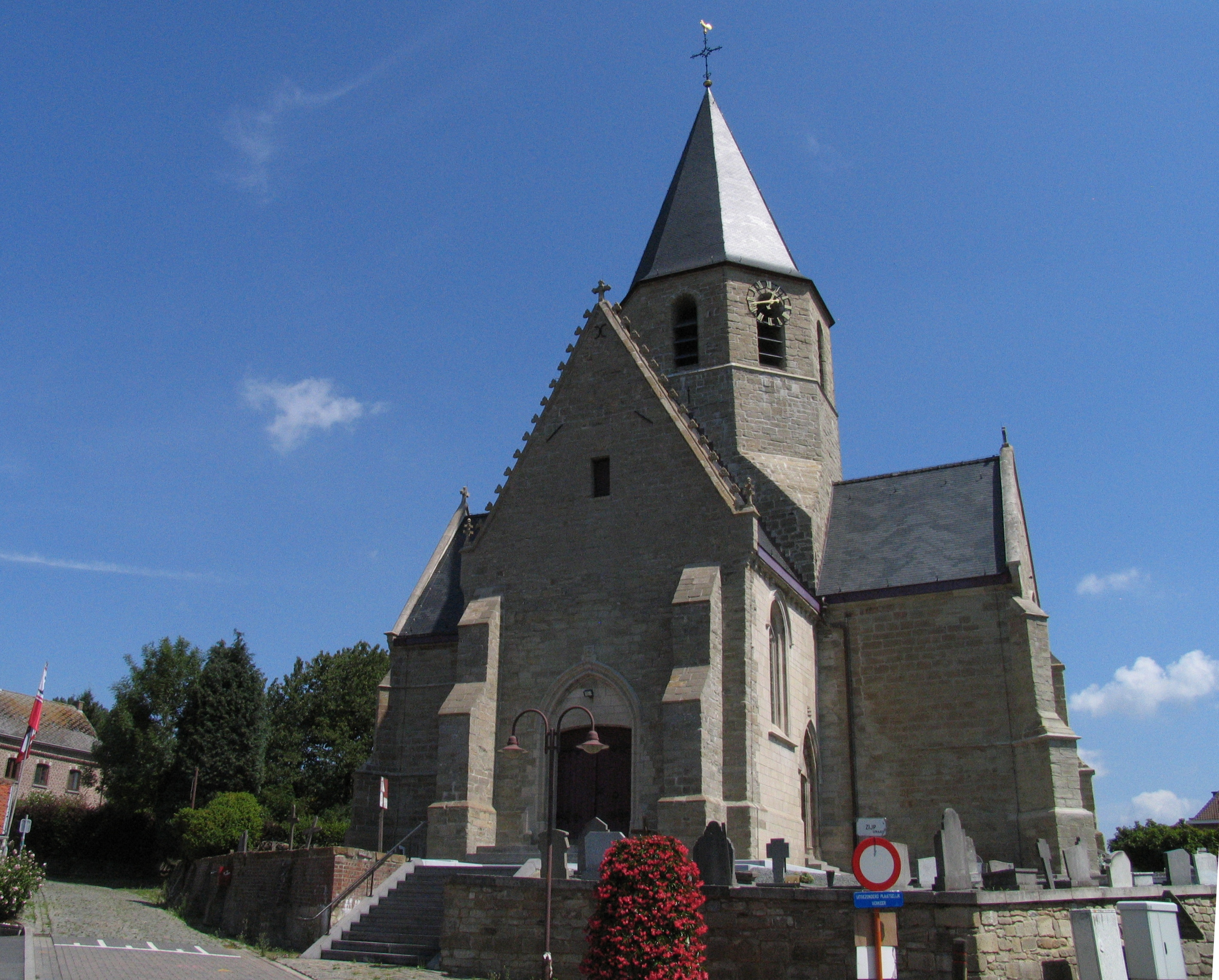 Geraardsbergen - Nieuwenhove - Zijpstraat zn - Parochiekerk Sint-Jan-de-Doper